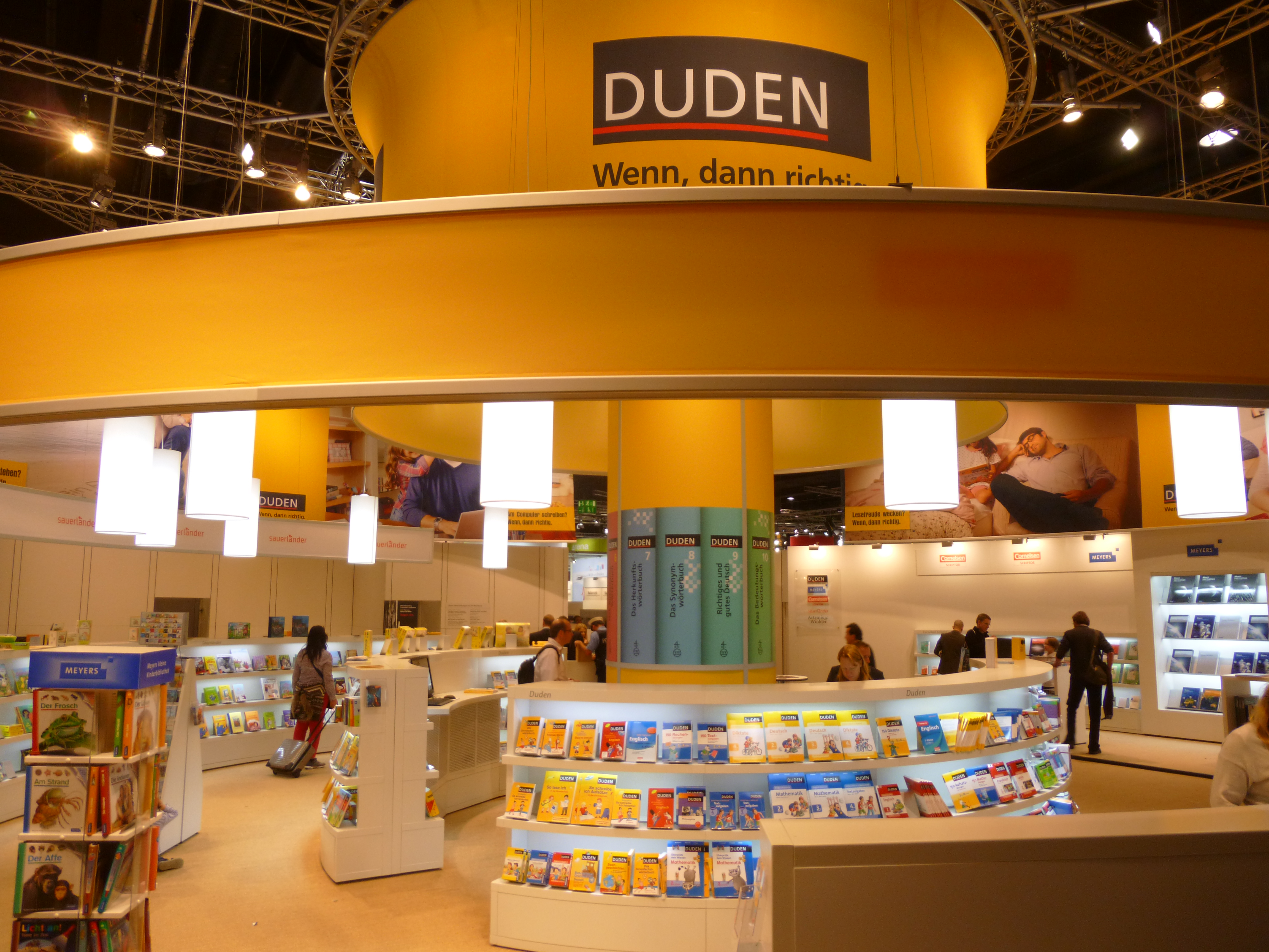 stando de la eldonejo Duden en la Frankfurta librofoiro 2012